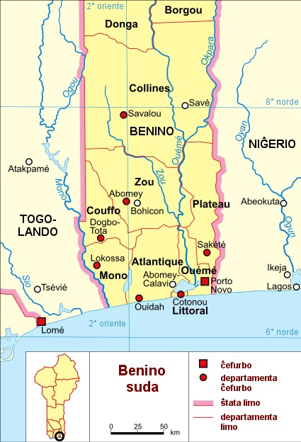 Mapo de la suda parto de Benino